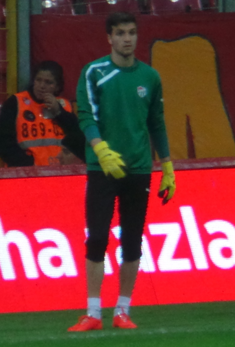 Okan Koçuk